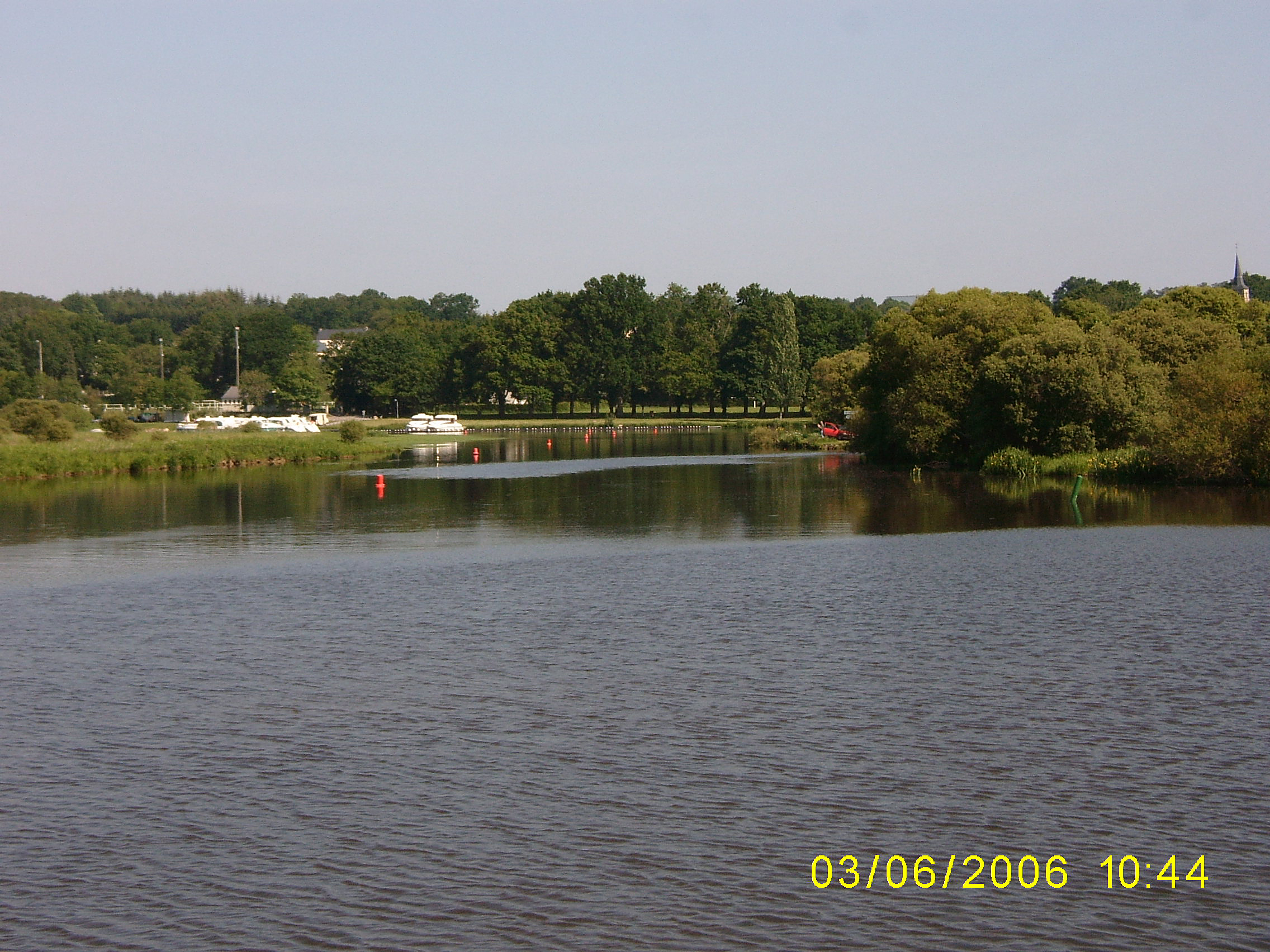 Die Marina von Glénac am Ufer des Oust (Morbihan, Bretagne, France)